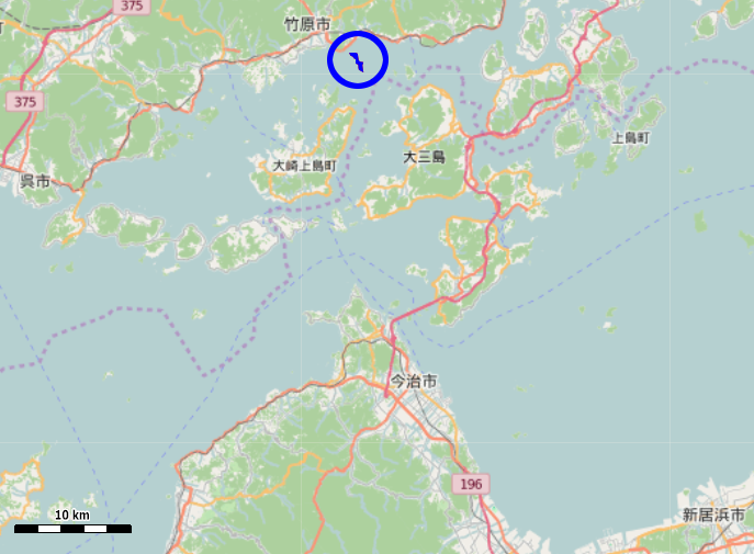 広島県竹原市の阿波島 This map may be incomplete, and may contain errors. Don't rely solely on it for navigation.